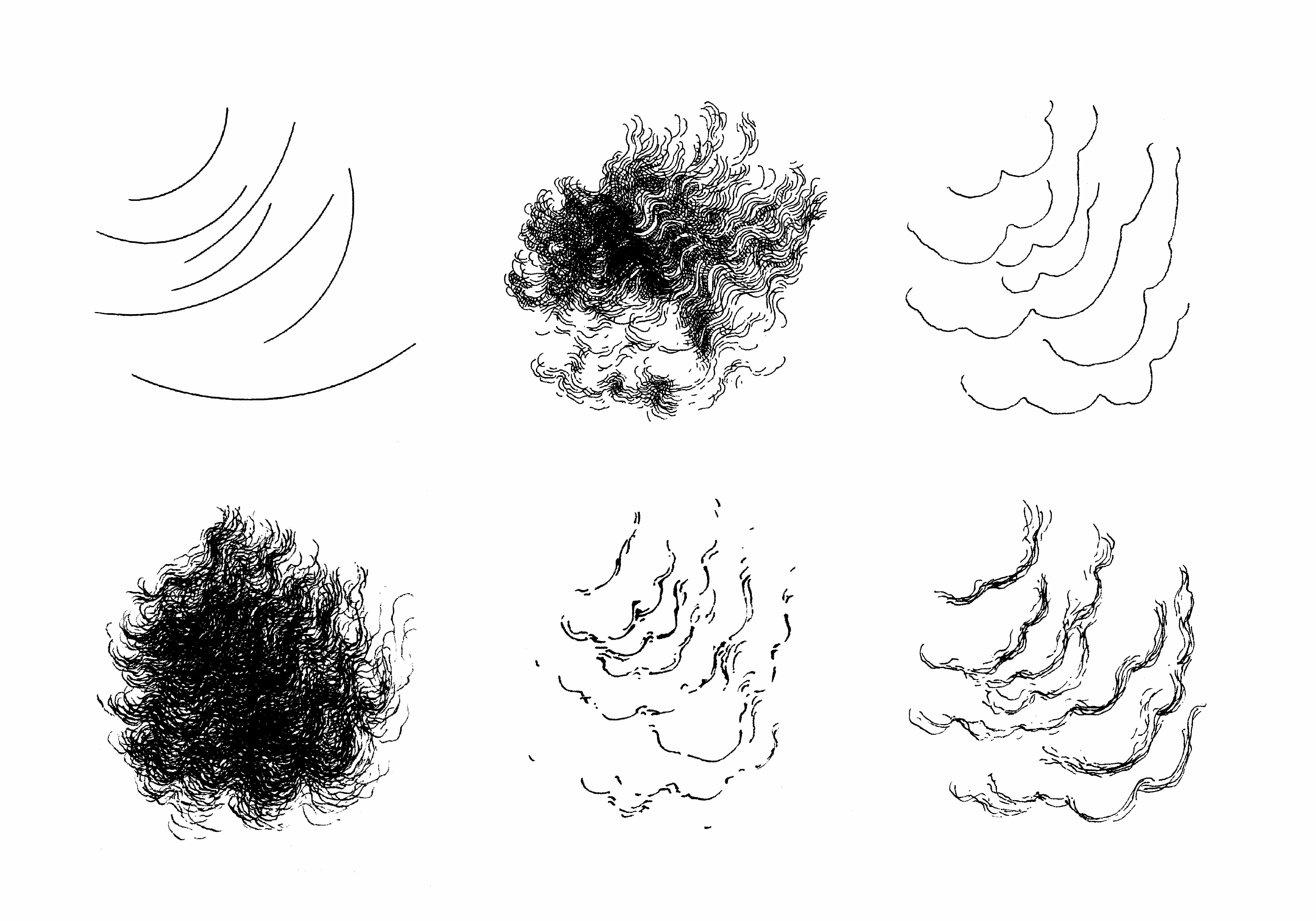 Emmanuel Fournier, page du livre "Catalogue de mers", éditions Corduriès, et carton d'invitation de l'exposition du même titre au CIPM, Marseille, 2007